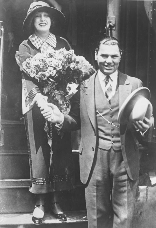 Der frühere Boxweltmeister Jack Dempsey von seiner Frau Estelle Taylor geschieden ! Jack Dempsey mit seiner Gattin Frau Estelle Taylor im ersten Jahr ihrer jetzt geschiedenen Ehe.